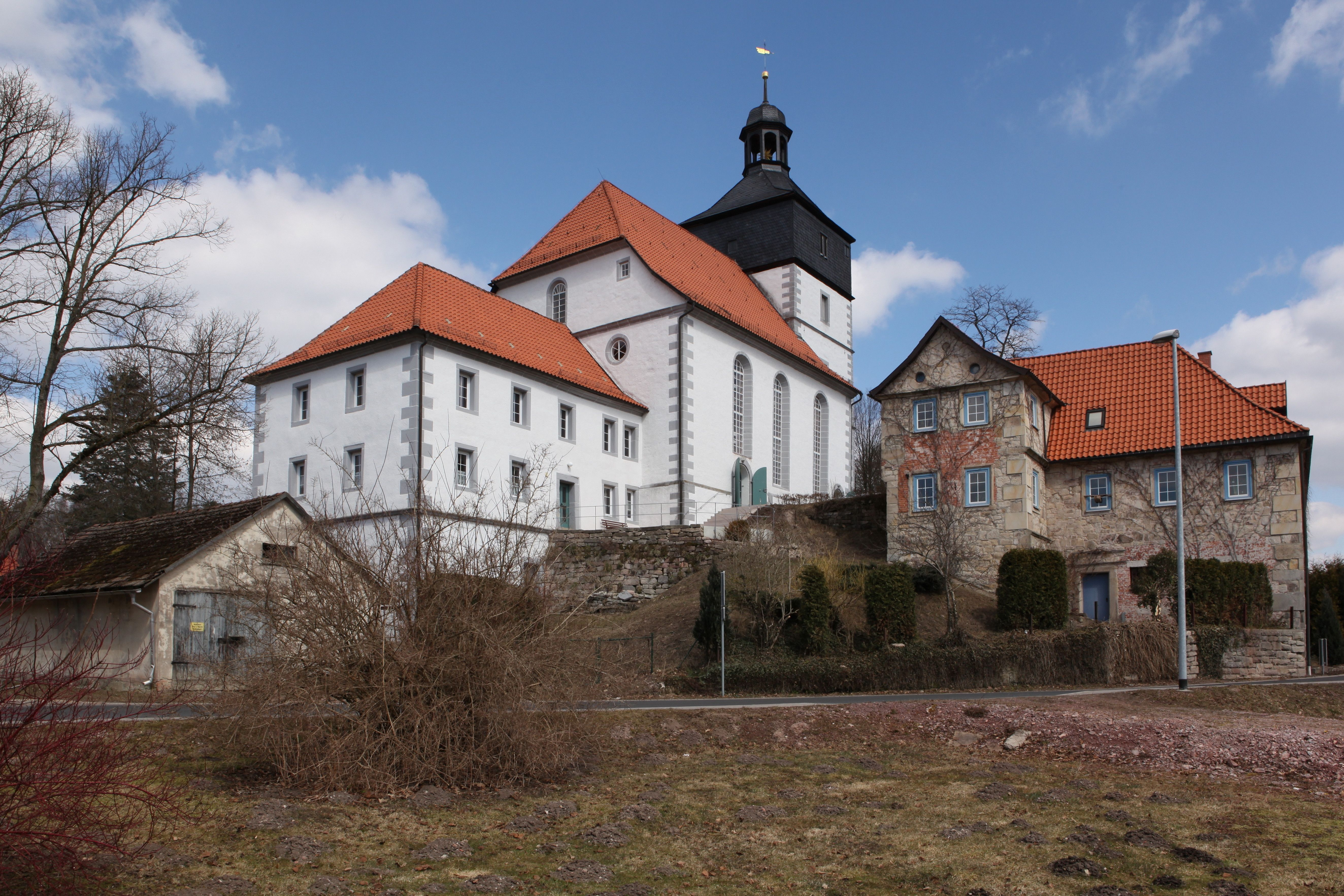 Evangelisch-Lutherische Kirche in Sankt Kilian, Ot von St. Kilian, Landkreis Hildburghausen